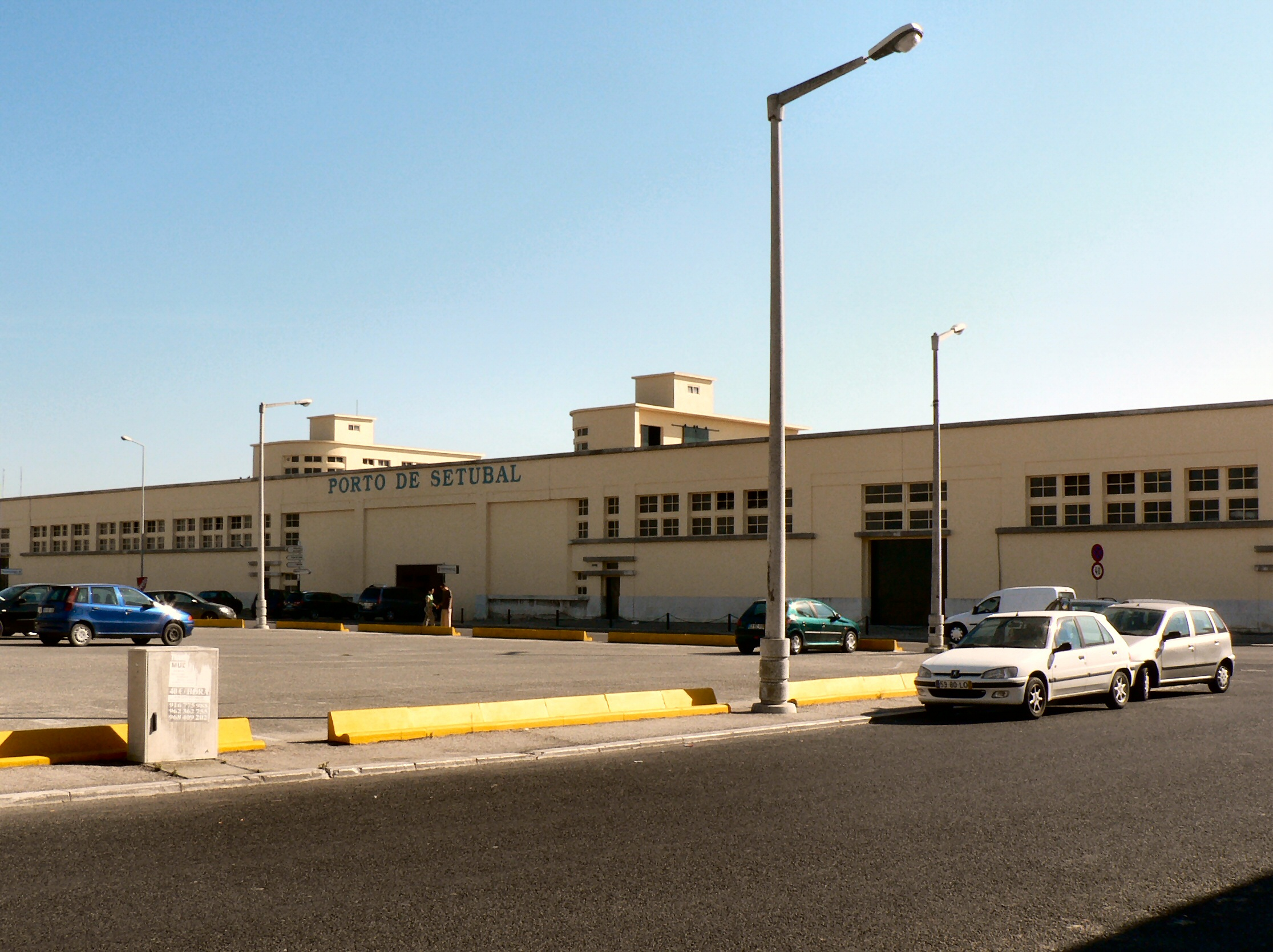 Porto de Setúbal (instalações), Setúbal, Portugal